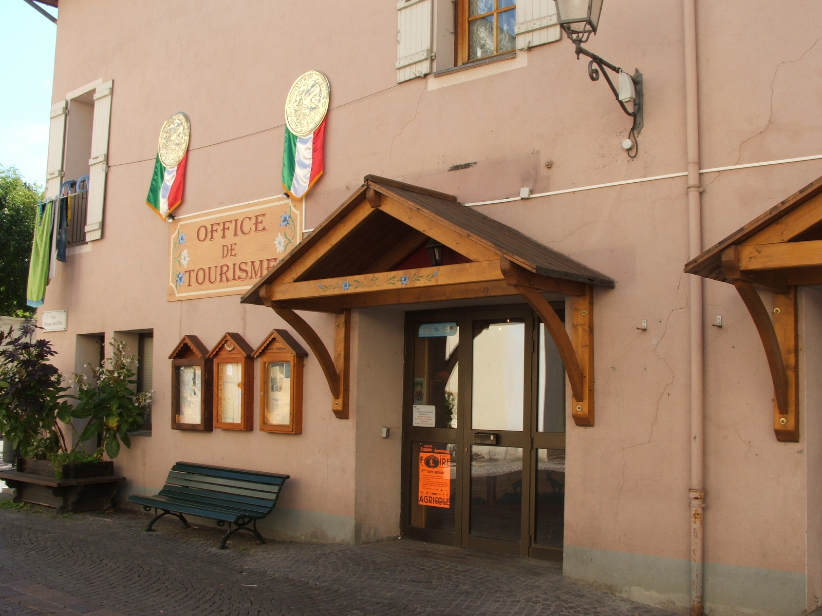 Barcelonnette, département des Alpes-de-Haute-Provence, France